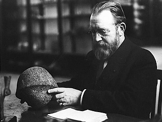 Jean-François-Désiré Capart (21 février 1877 à Bruxelles - 16 juin 1947) est un égyptologue belge, considéré comme le père de l'égyptologie belge.